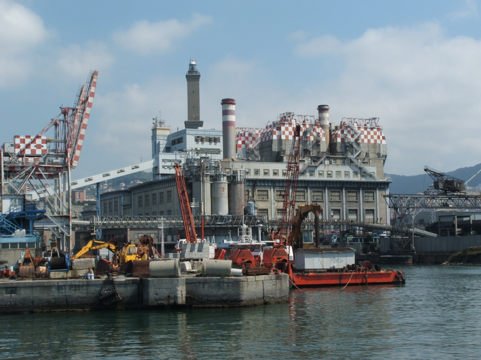 Porto di Genova, Italia.